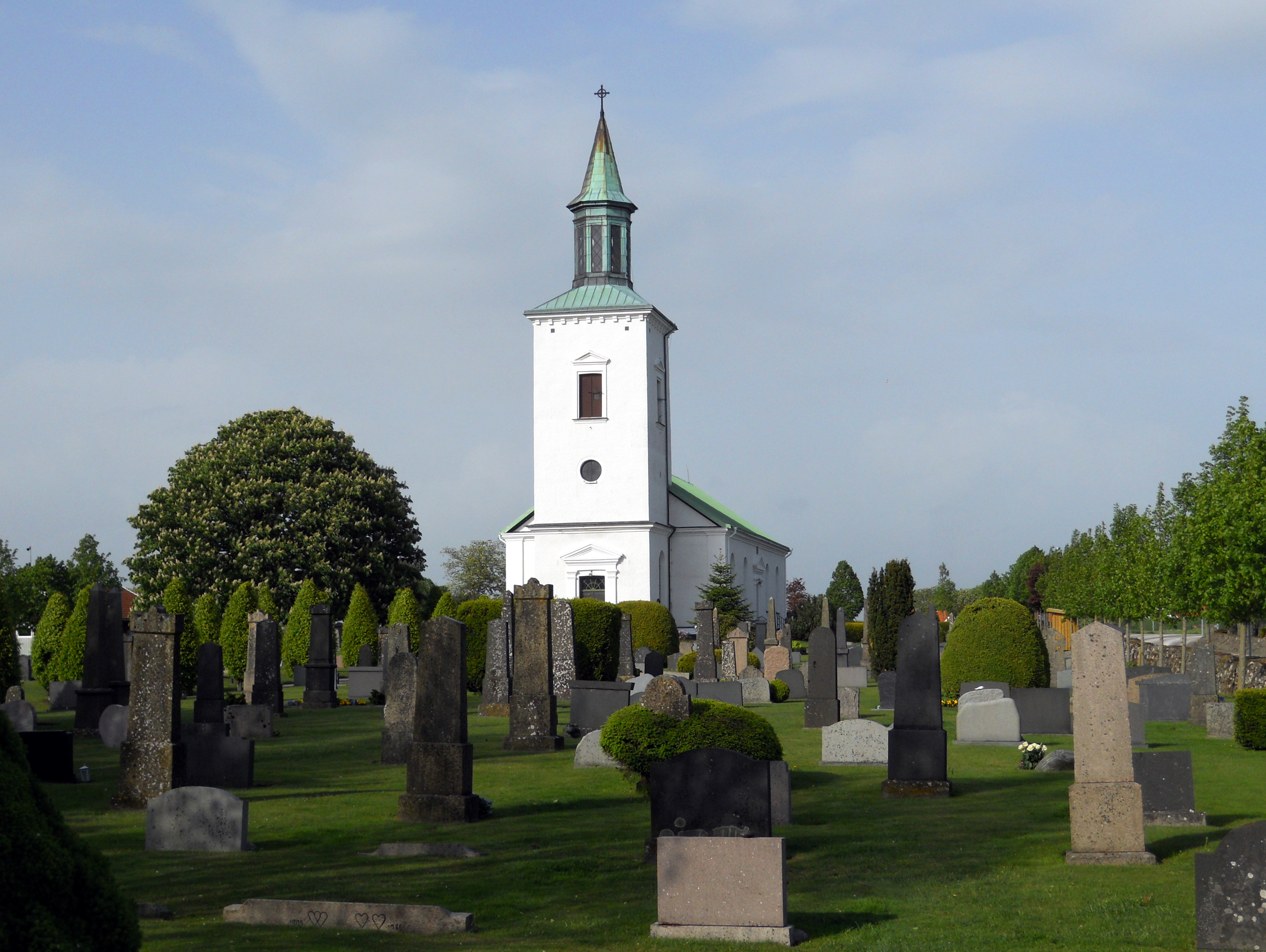 Träslövs kyrka, Halland.